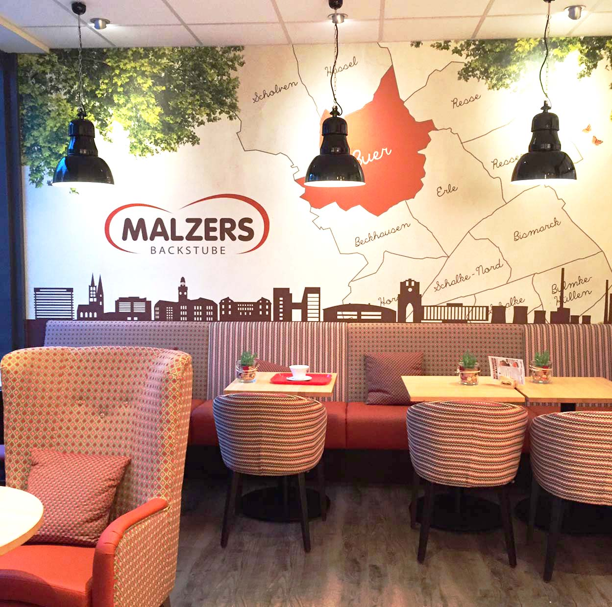 Sitzgelgenheiten in der MALZERS Backstuben-Filiale in Gelsenkirchen Buer.